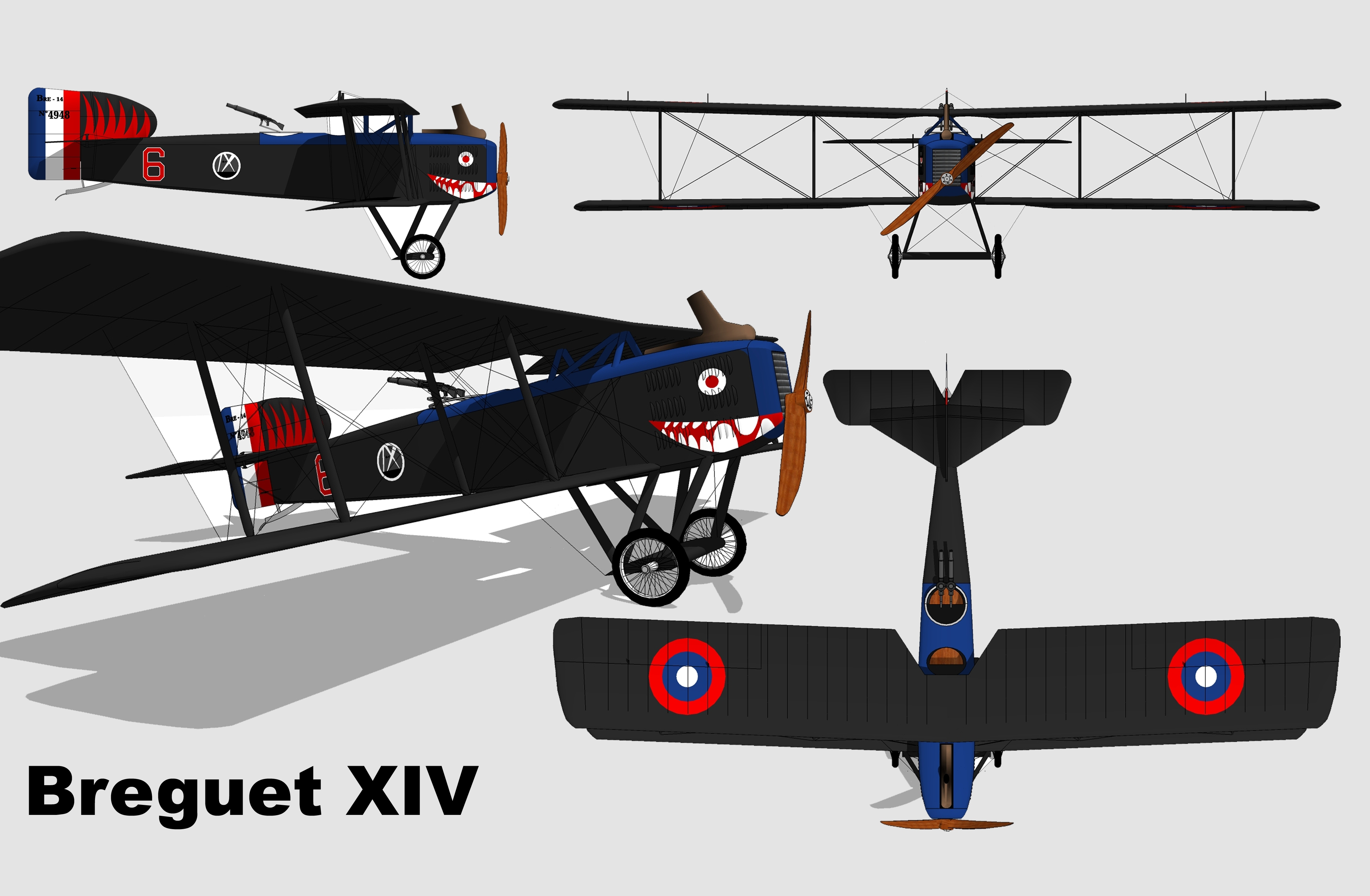 Plan 3 vues du Breguet 14